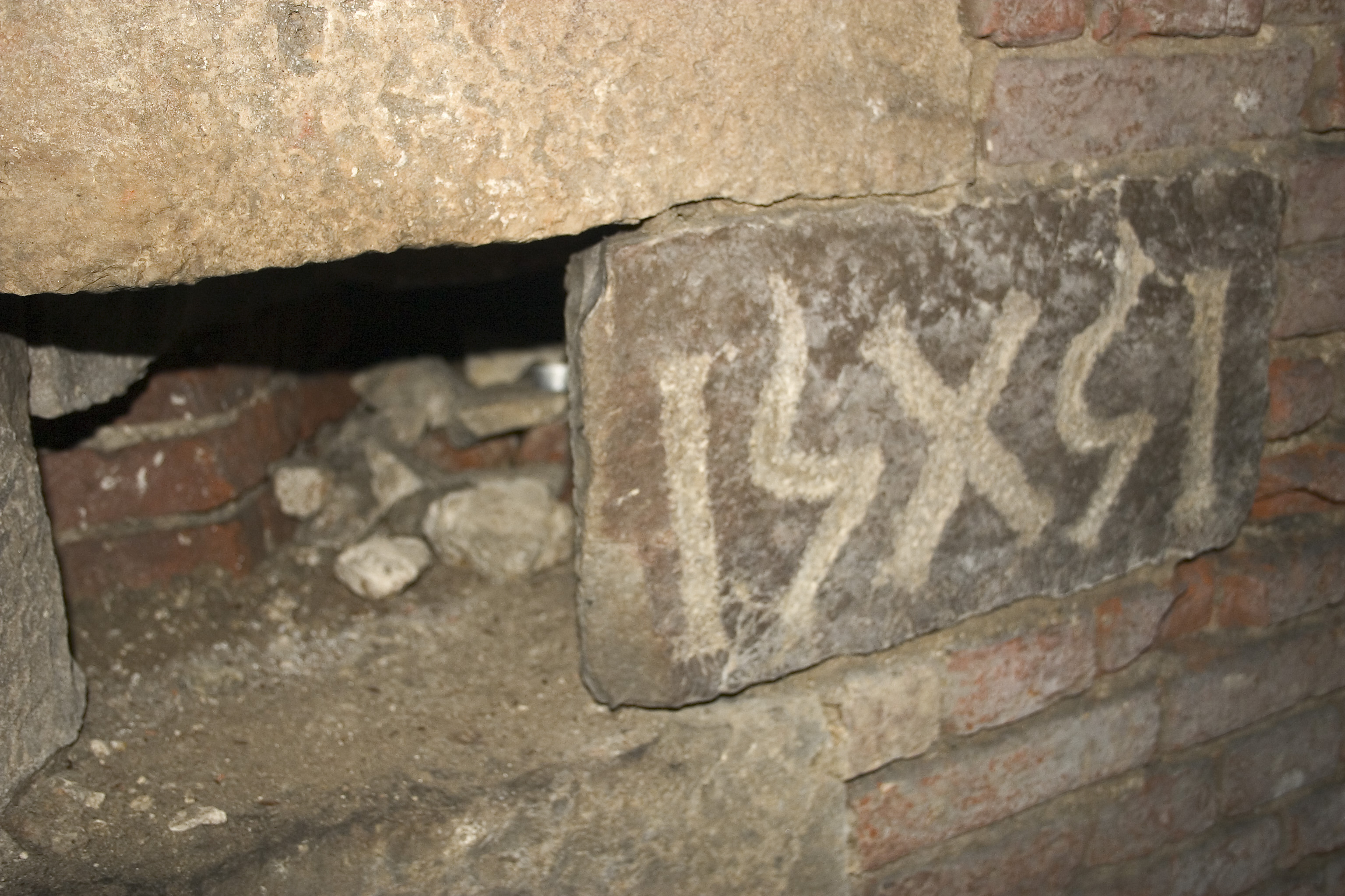 Bapaume pierre de 1551 posée à l'envers dans le bastion de la Reyne